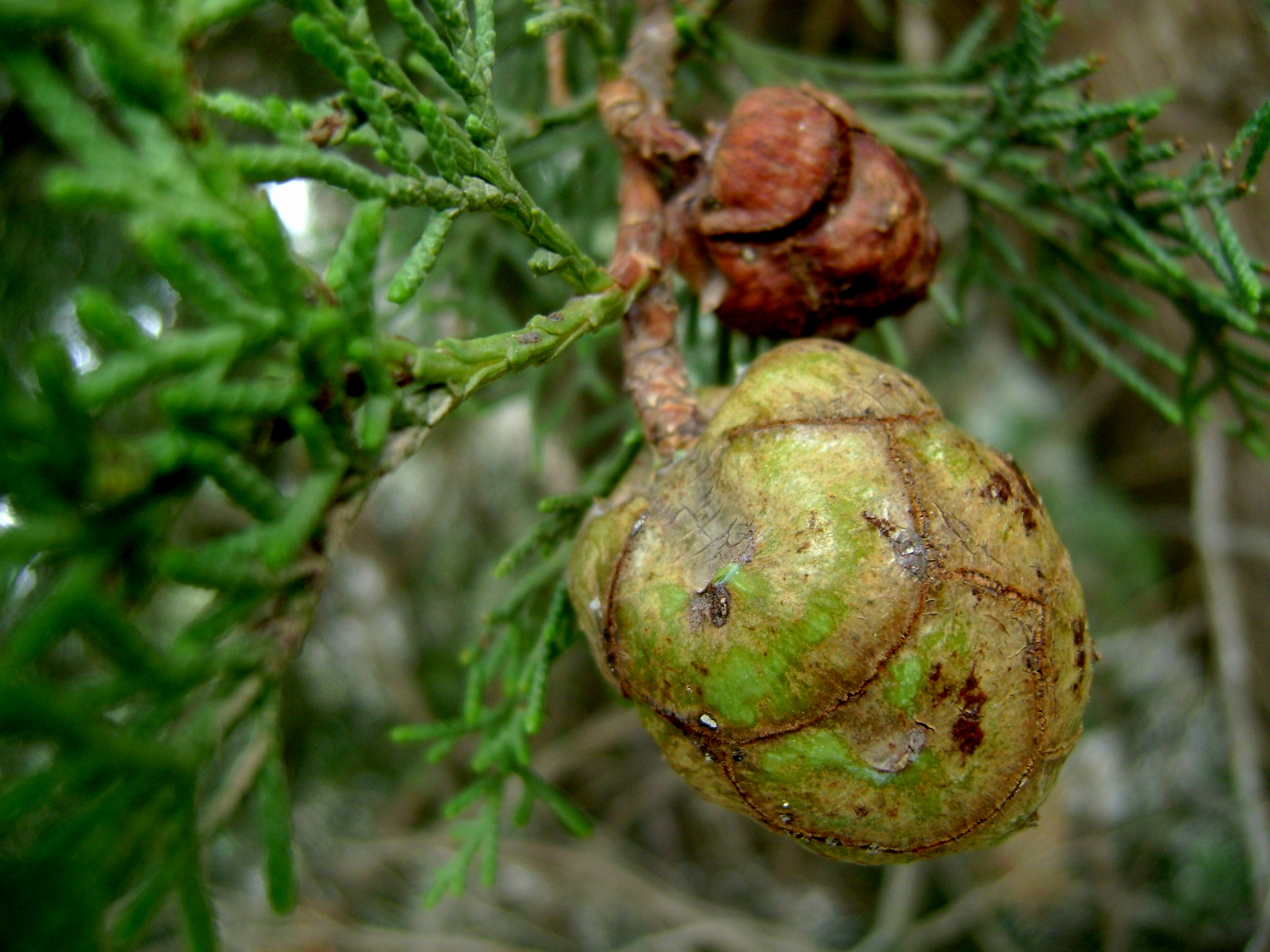 Arbre de Cupressus sempervirens dans la foret de Nahli Ariana-Tunis